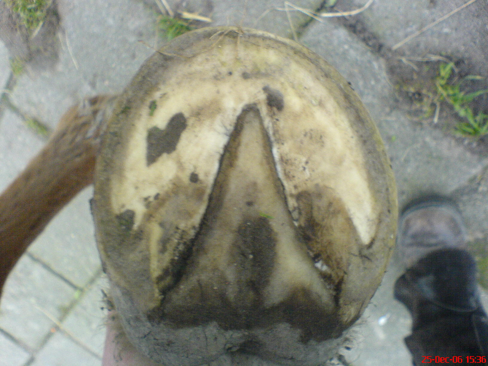 eigen foto